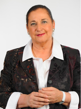 Martine Faure, députée de la neuvième circonscription de la Gironde